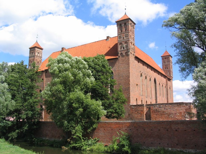 Schlossanlage der Bischöfe von Ermland - Hochschloss (Heilsberg / Lidzbark Warmiński)